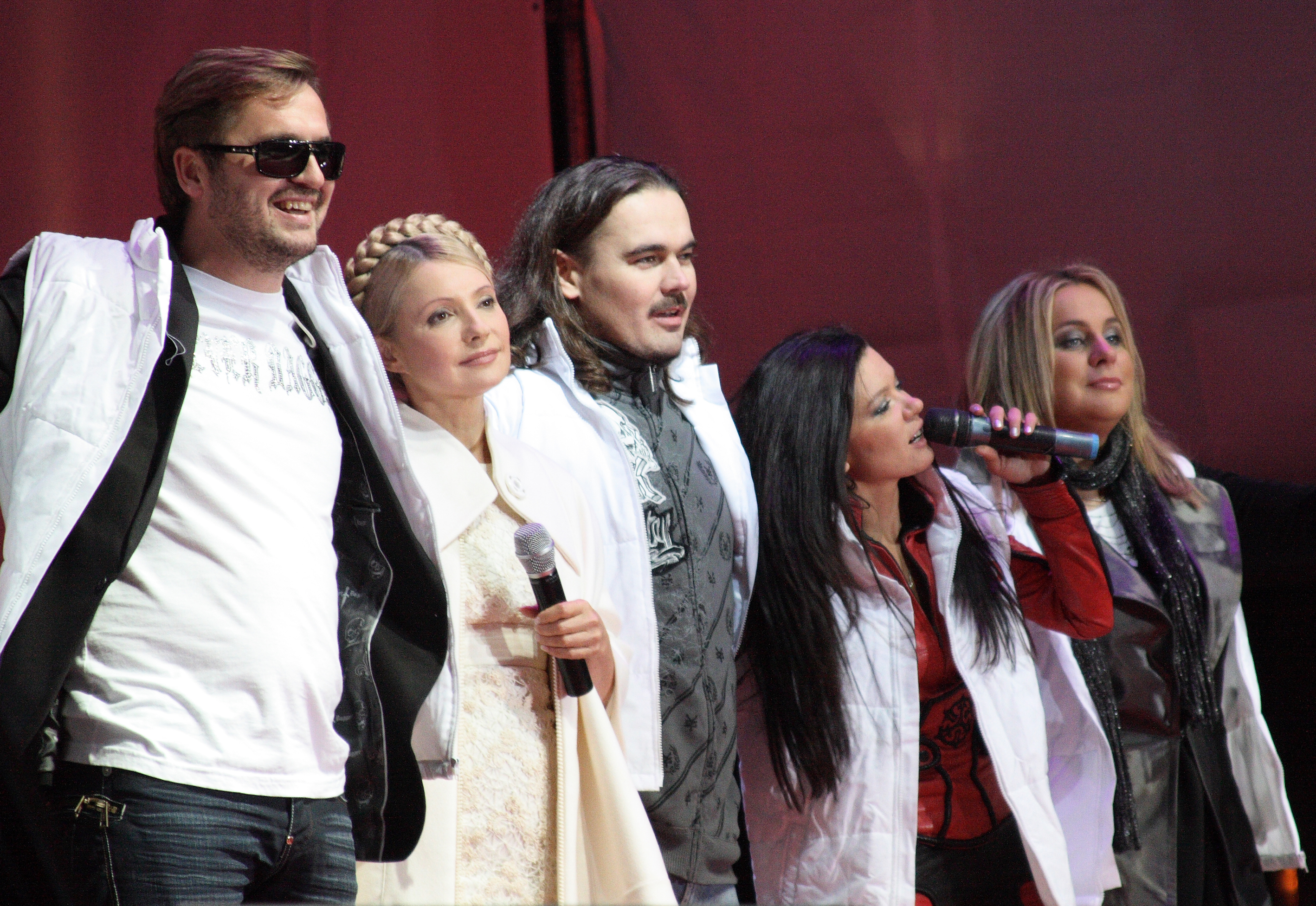 Юлия Тимошенко на концерте в её поддержку как кандидата на пост президента Украины. Слева-направо: Александр Пономарёв, Юлия Тимошенко, Олег «Фагот» Михайлюта, Руслана Лыжычко, ????